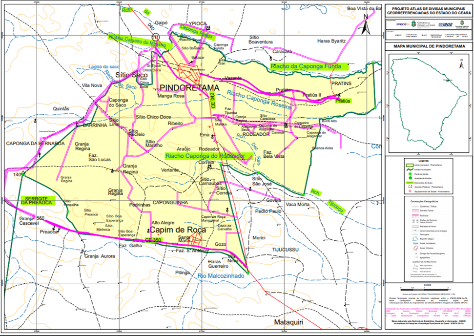 Novo Mapa de Pindoretama 2019